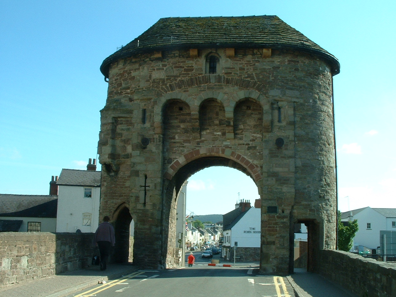 eigen opname